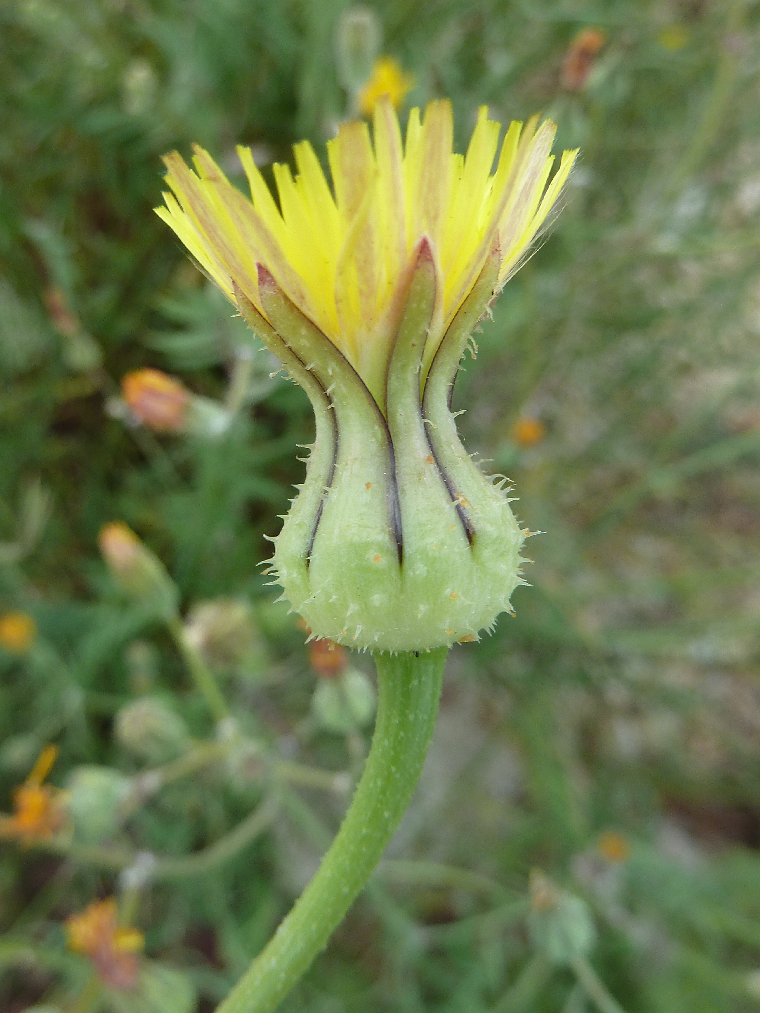 Urospermum picroides : Inflorescencia a principio de la antesis- Camino de Granja de Rocamora a Catral, Albatera (Alicante, España).